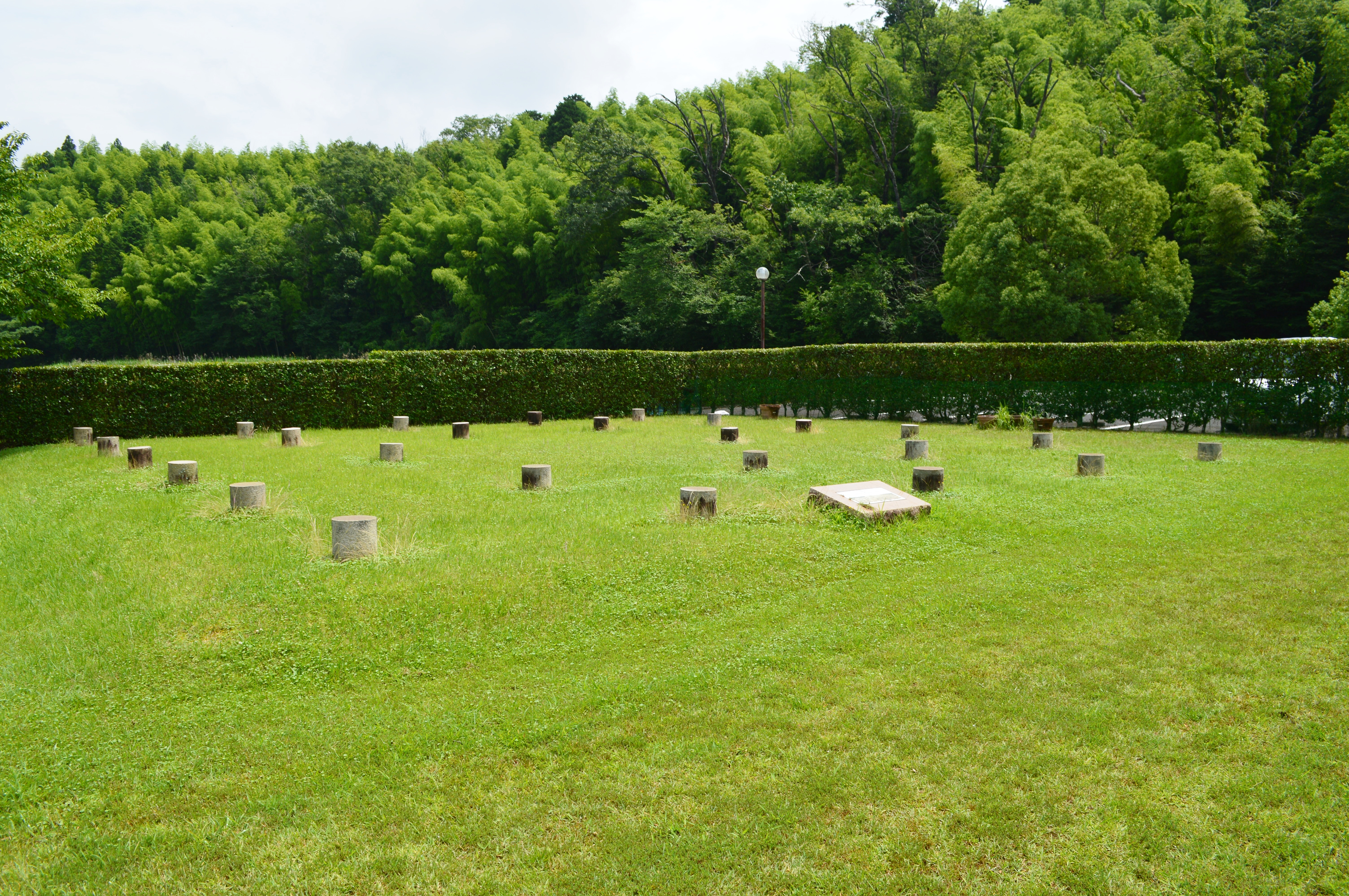 城之越遺跡 大型掘立柱建物 Nikon D3200